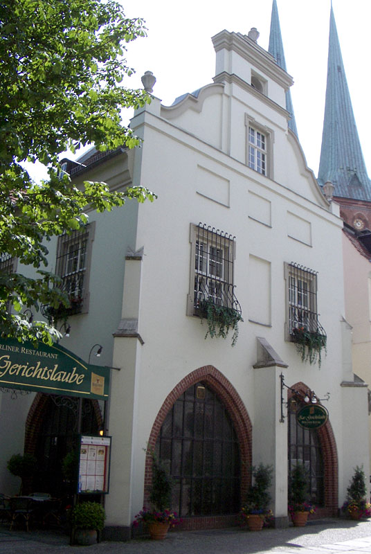 Das Gebäude Gerichtslaube in der Poststraße in Berlin (Mitte/Nikolaiviertel) von außen im Sommer 2005.